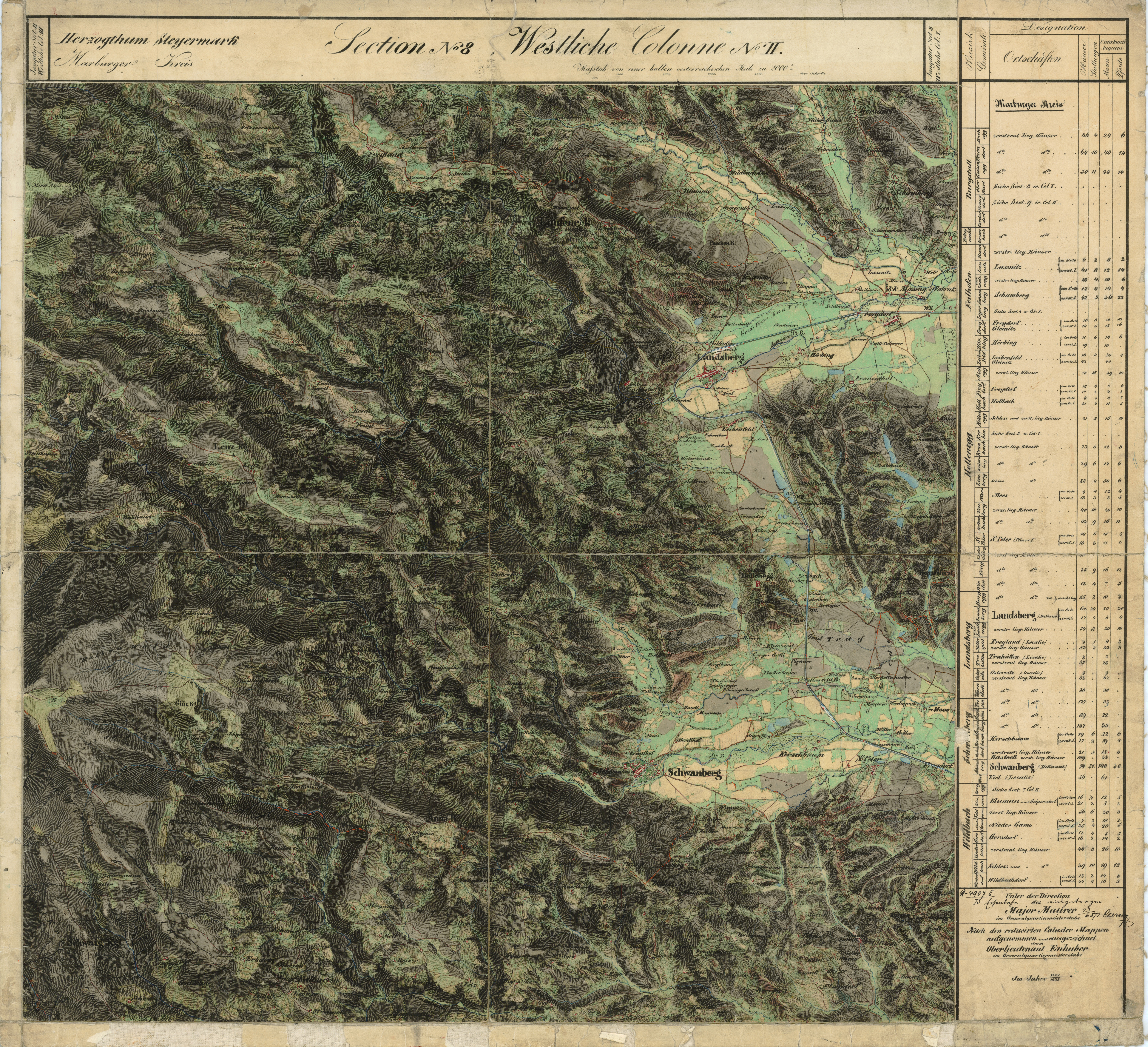 historische Landkarte, Franziszeische Landesaufnahme, Blatt sectio 08 westliche columne II Weststeiermark, Koralmgebiet, Landsberg bis Osterwitz